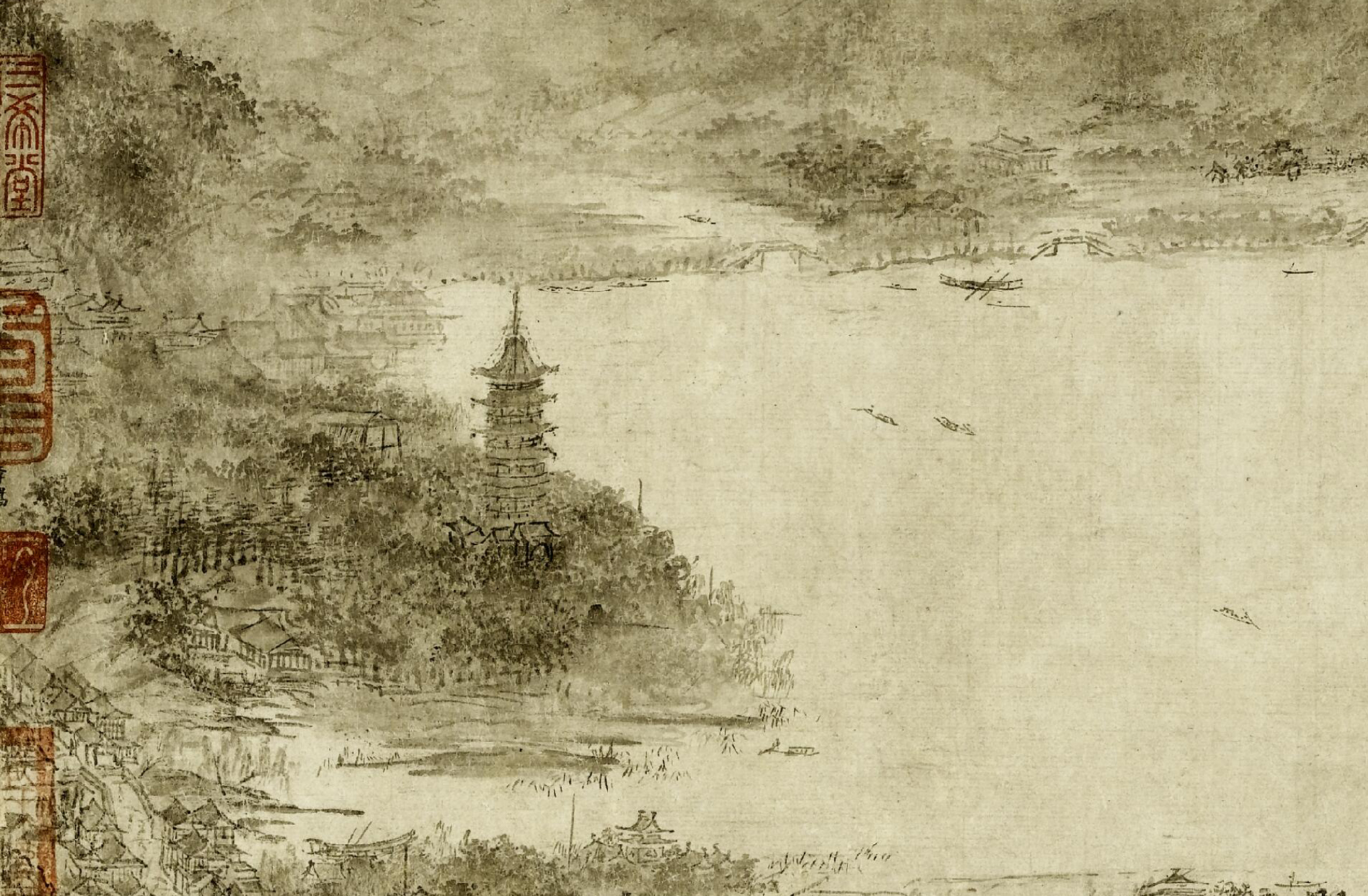 南宋李嵩《西湖图》局部，示雷峰塔南宋时的形象